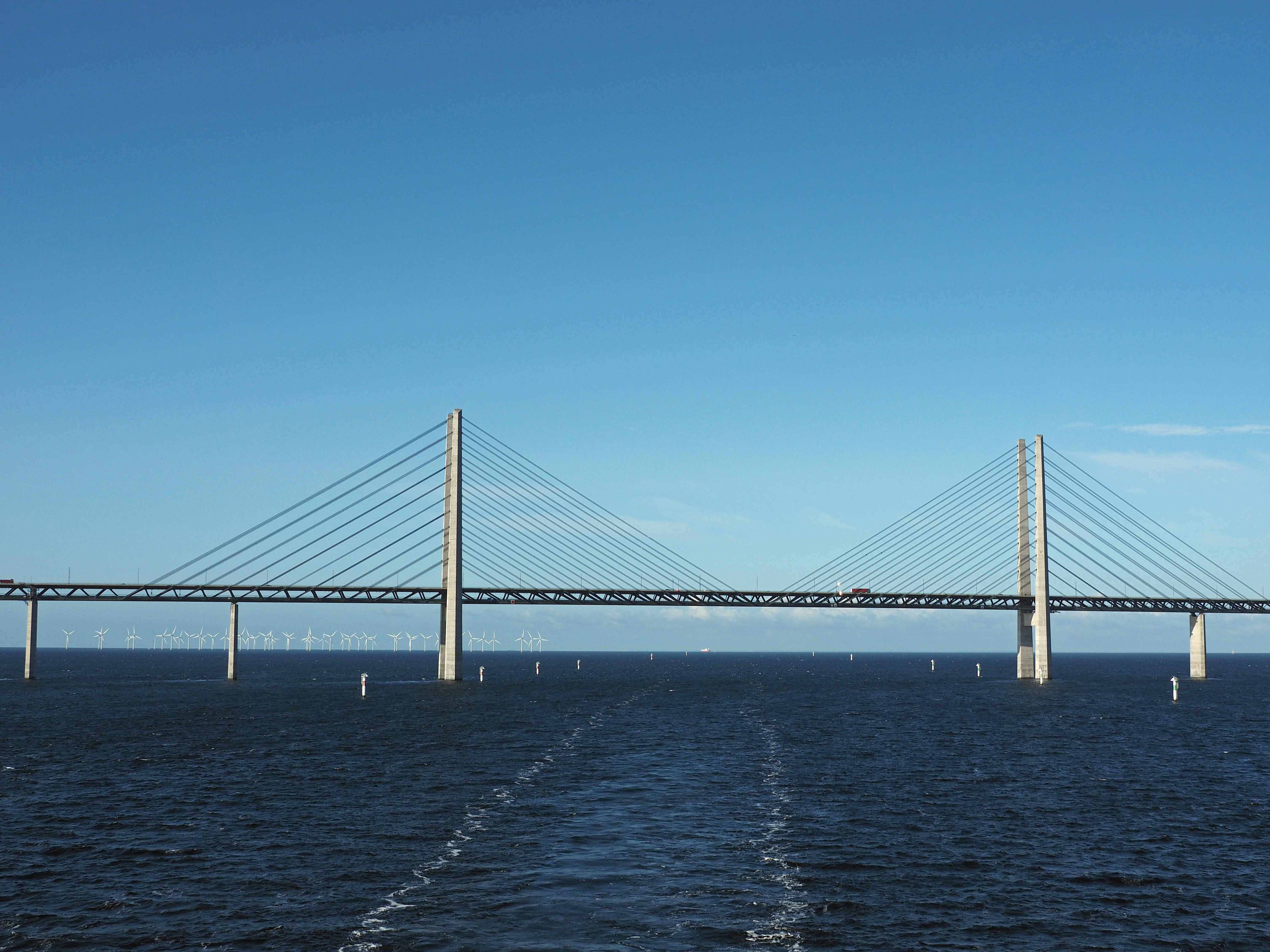 Öresundbrücke, Durchfahrt, Pfeiler mit Schrägseilen